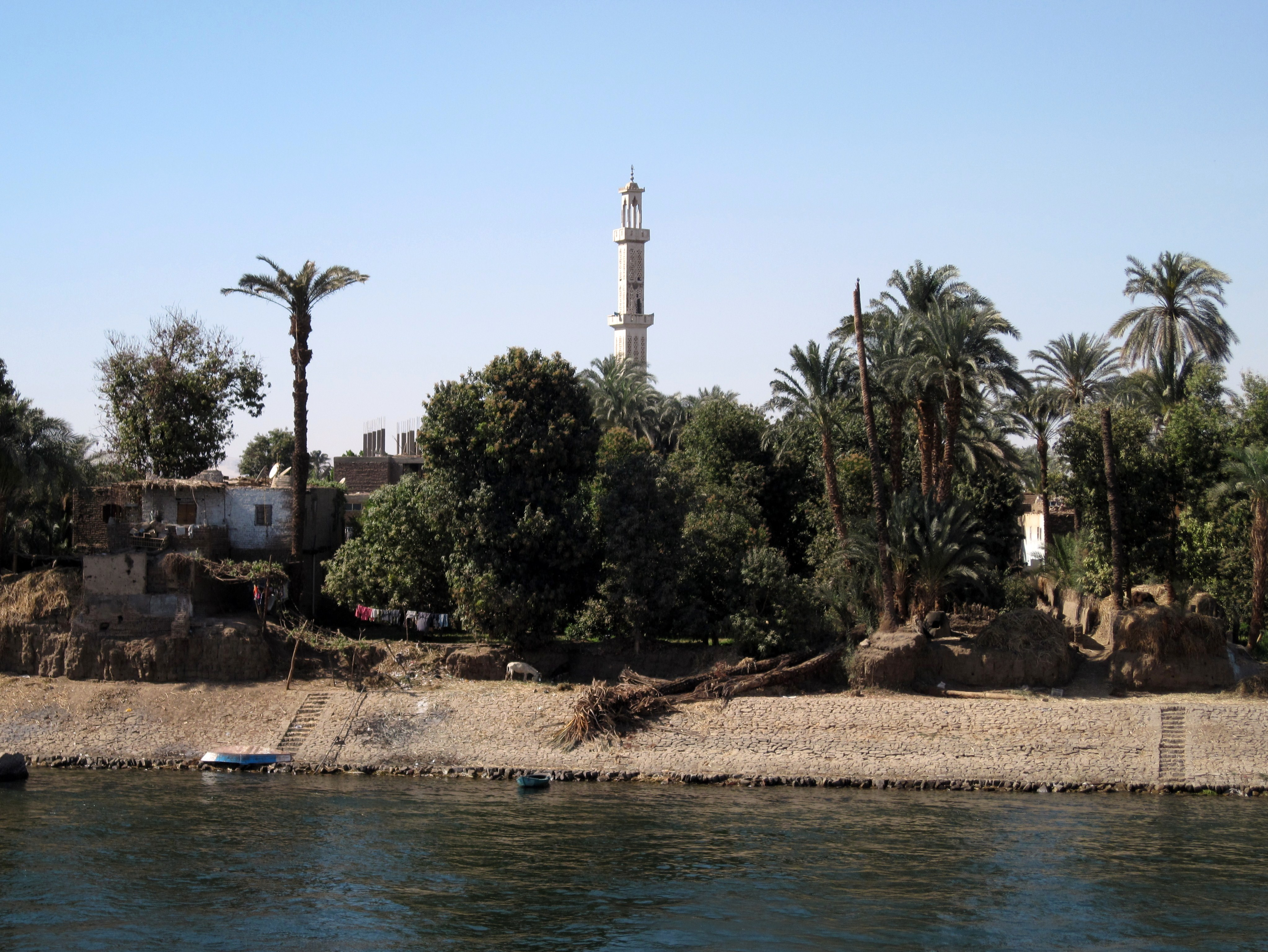 Nordwestliches Nilufer bei Armant südwestlich von Luxor, Ägypten